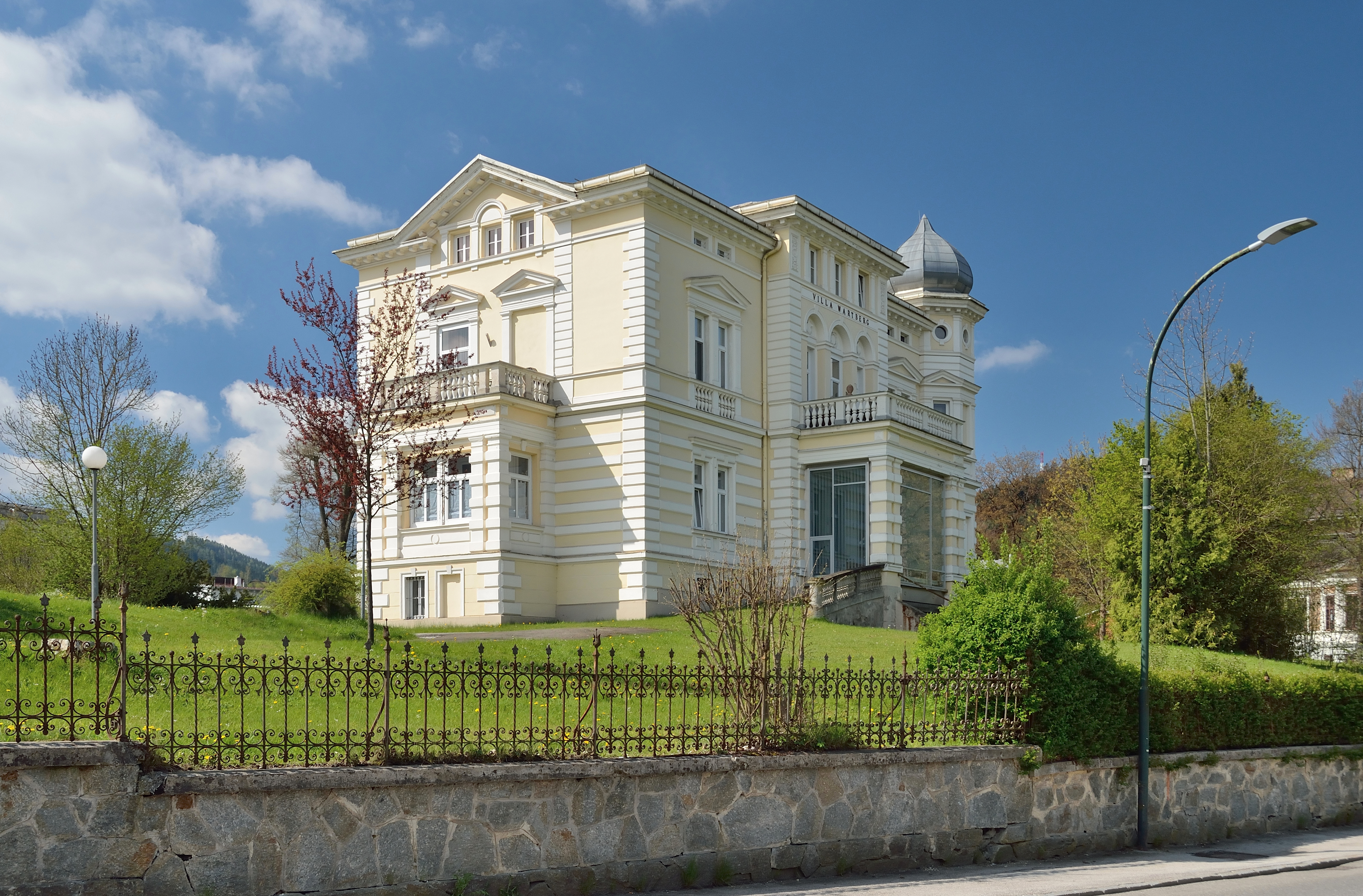 Villa Wartberg, Dorfstraße 8, Wartberg im Mürztal. Ende 19. Jh. erbaut.